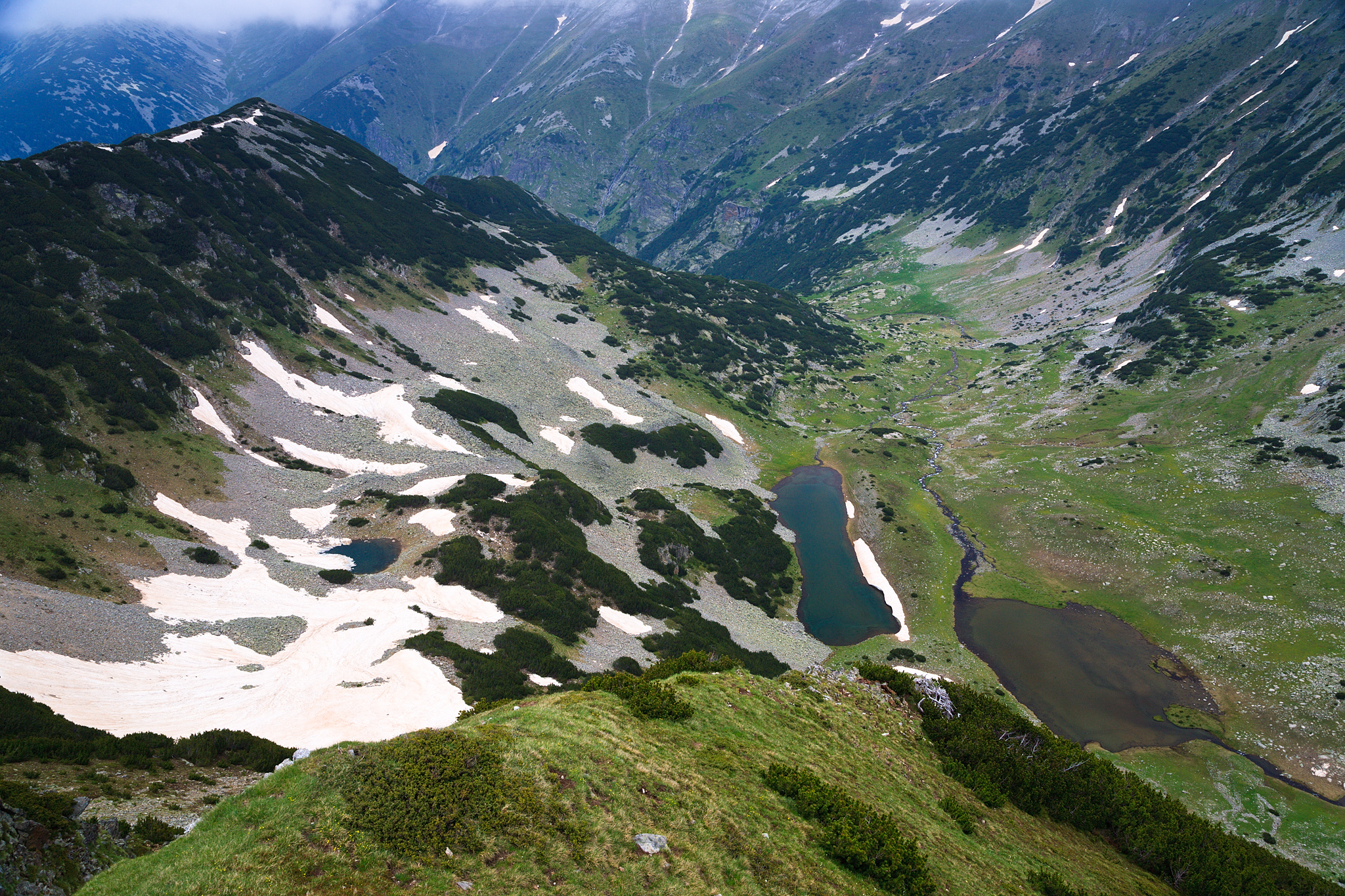 Пирин, Пирин, Влахинските езера